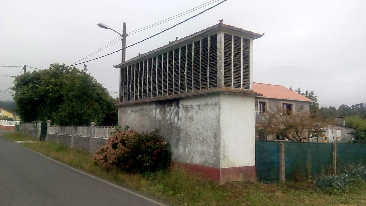 Vista de Vilacornelle, O Val.